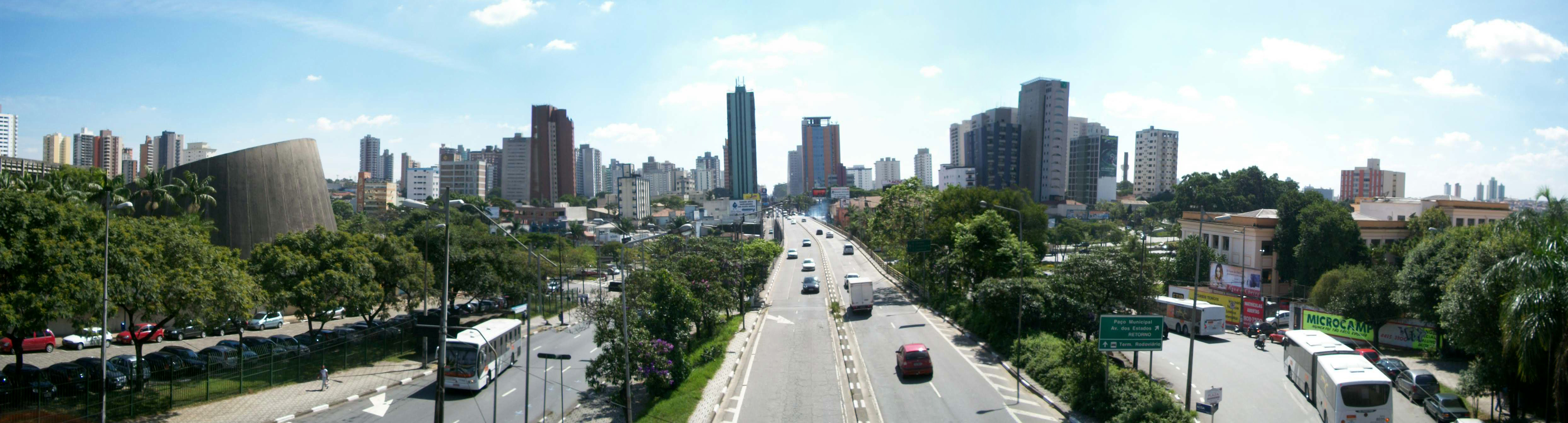 Santo André - Superpanorâmica - Av. D. Pedro II, indo para S.C.Sul; Esq. Teatro Municipal; Dir. EESG. "Américo Brasiliense"